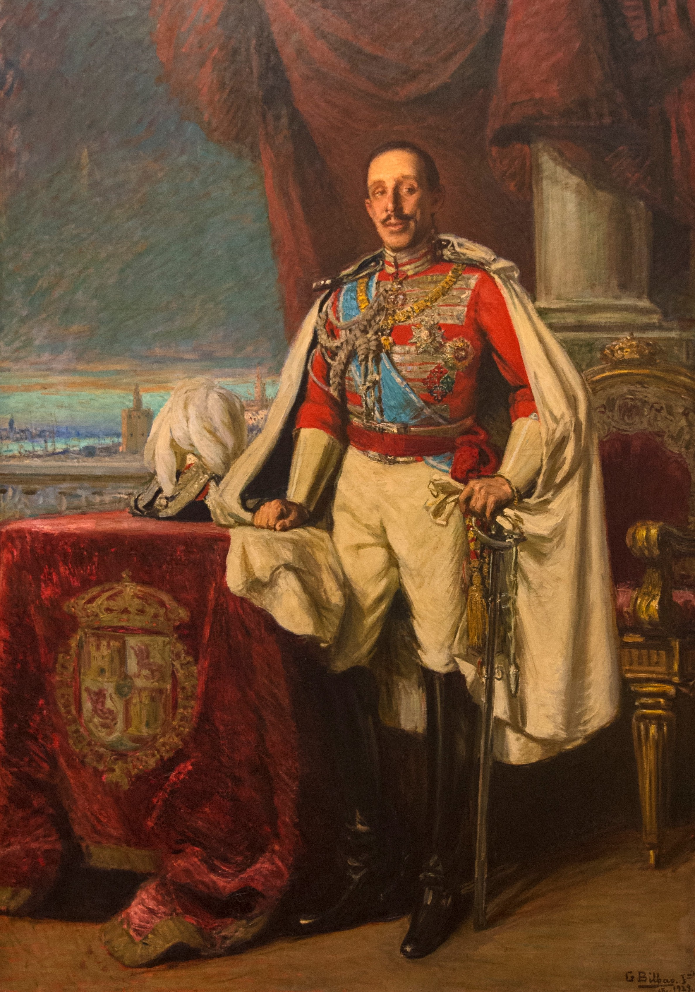 Retrato del rey Alfonso XIII de España (1886-1941), que aparece vestido con el uniforme de caballero de la Real Maestranza de Caballería de Sevilla.